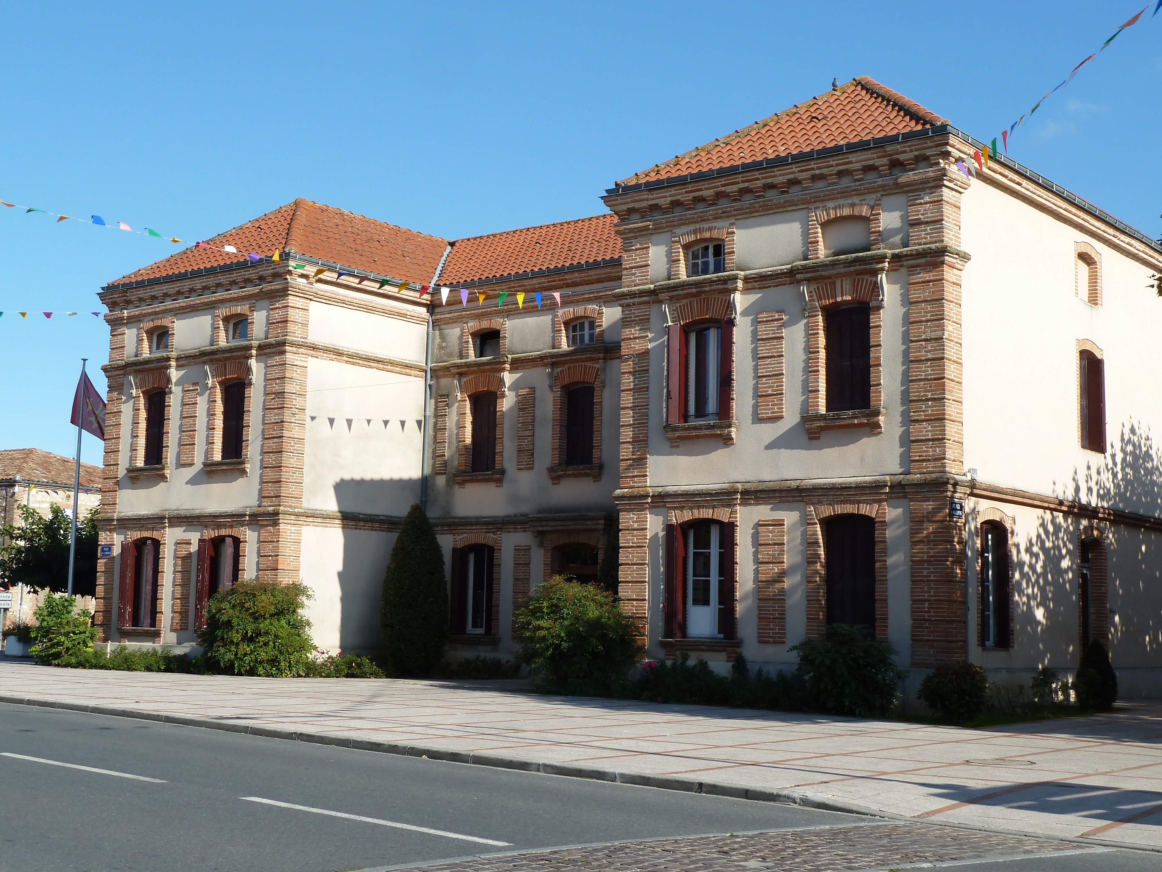 Briatexte (Tarn) - Mairie